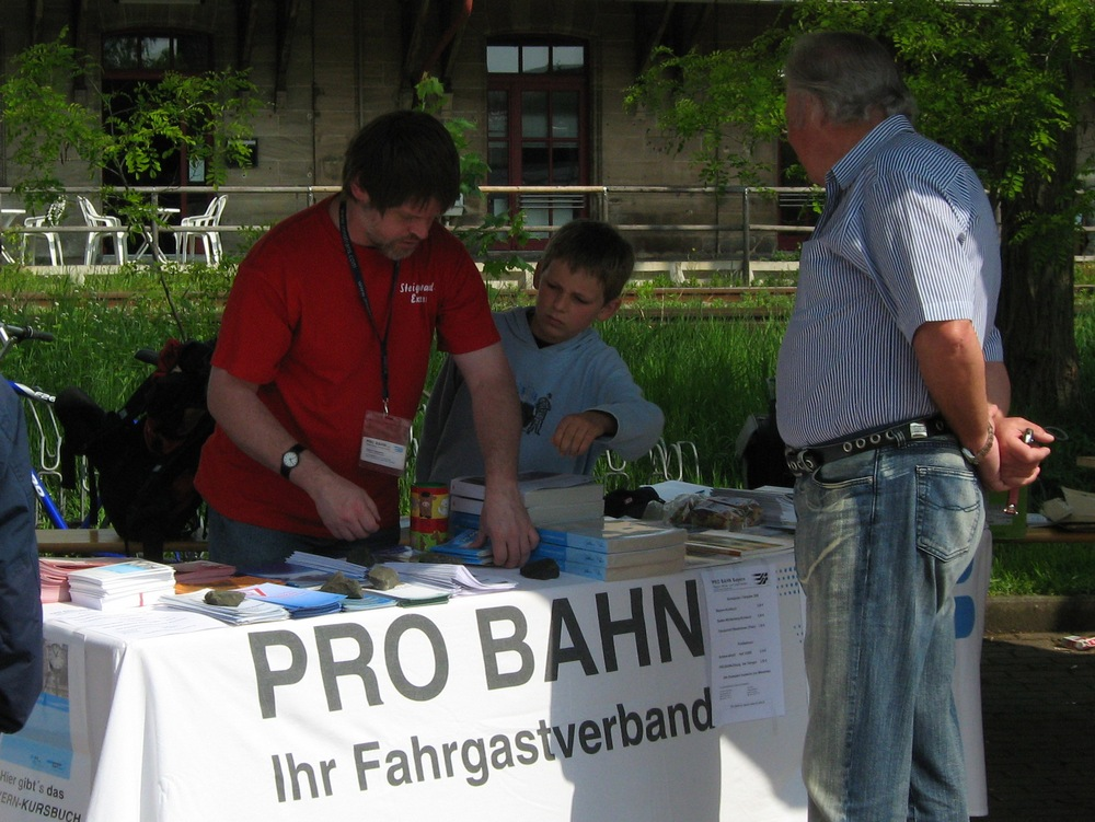 Pro-Bahn-Infostand in Lauf an der Pegnitz